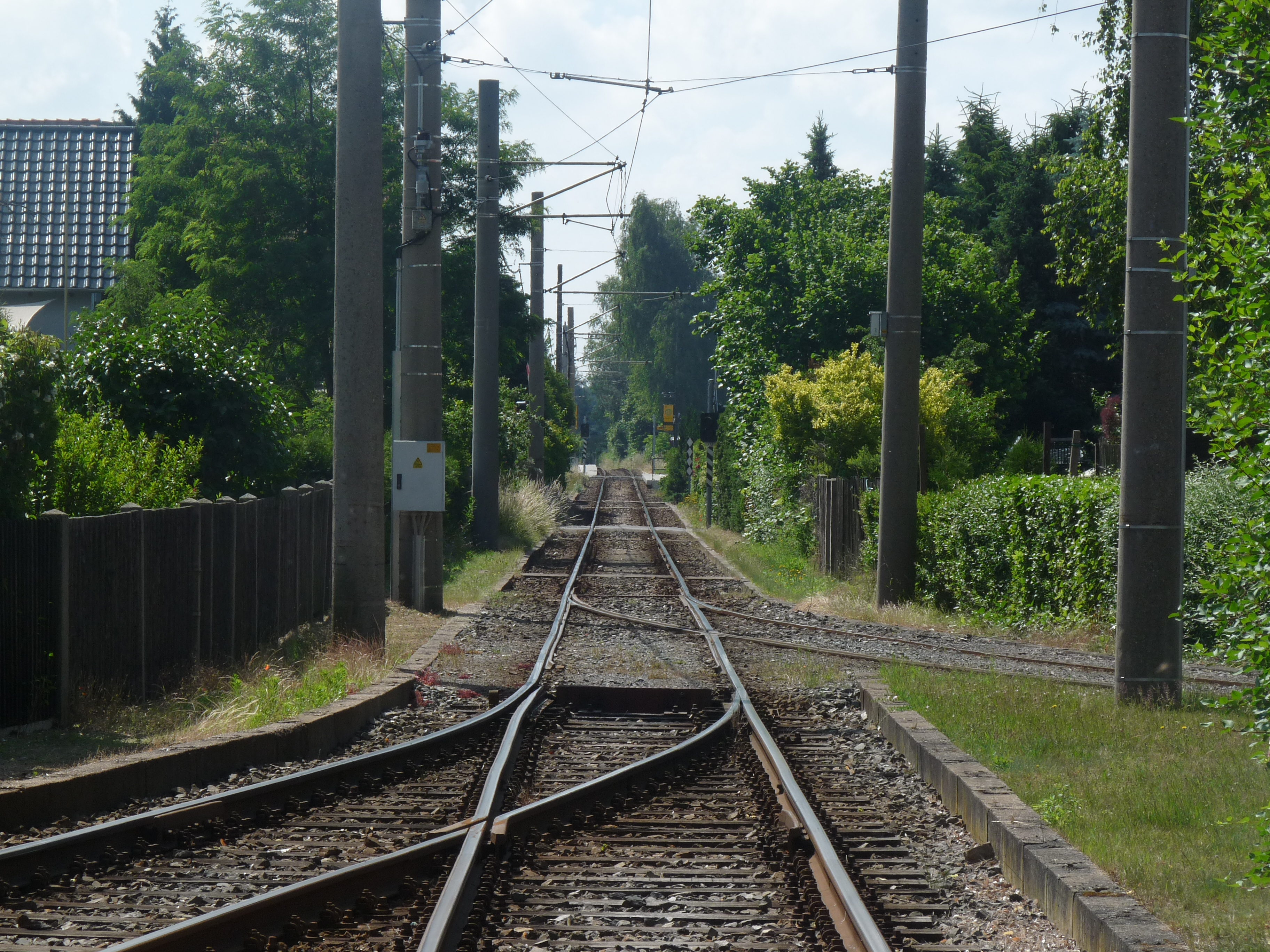 Trameindpunt in Weinböhla